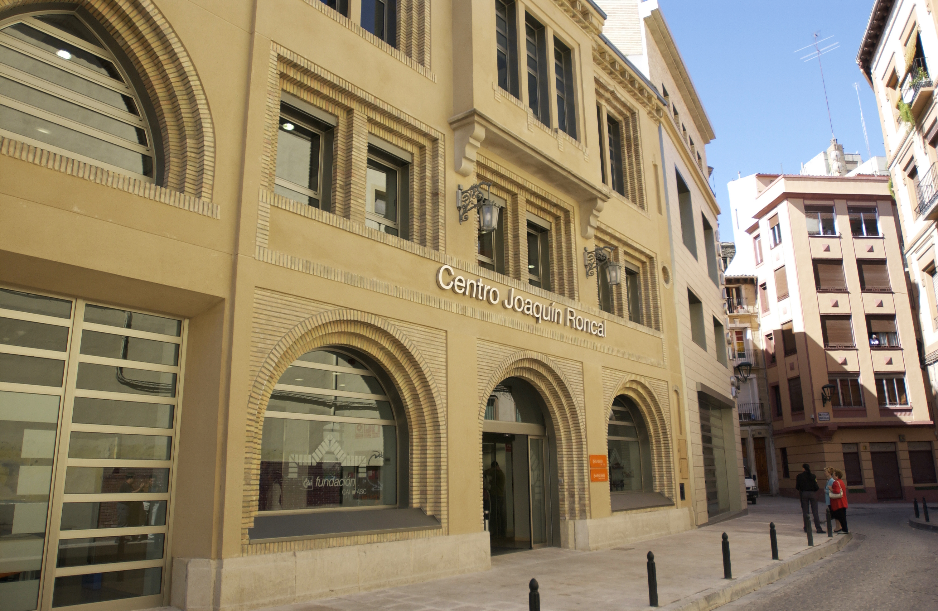 Fachada del Centro Joaquín Roncal de Zaragoza